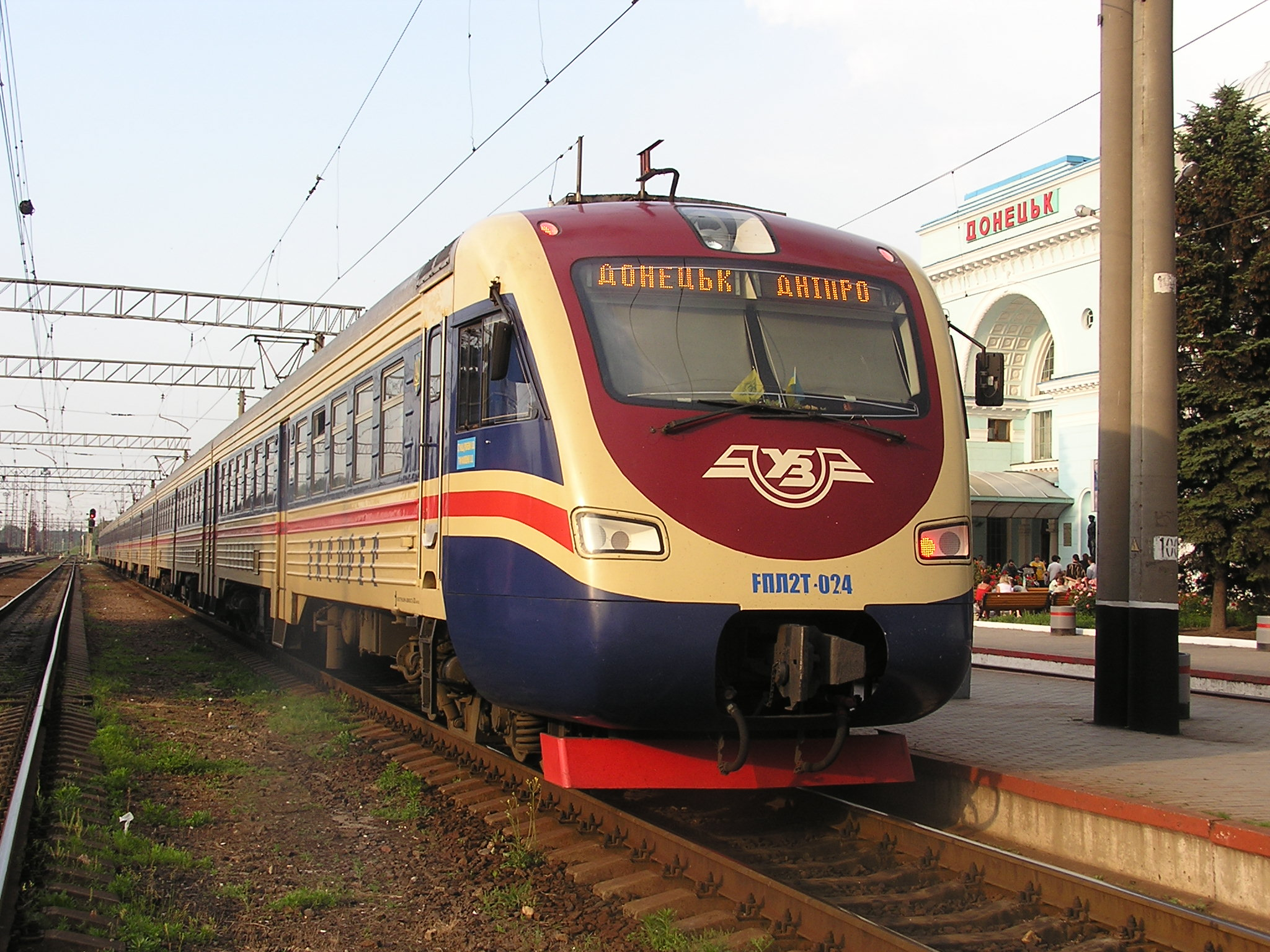 ЖД вокзал в Донецке.